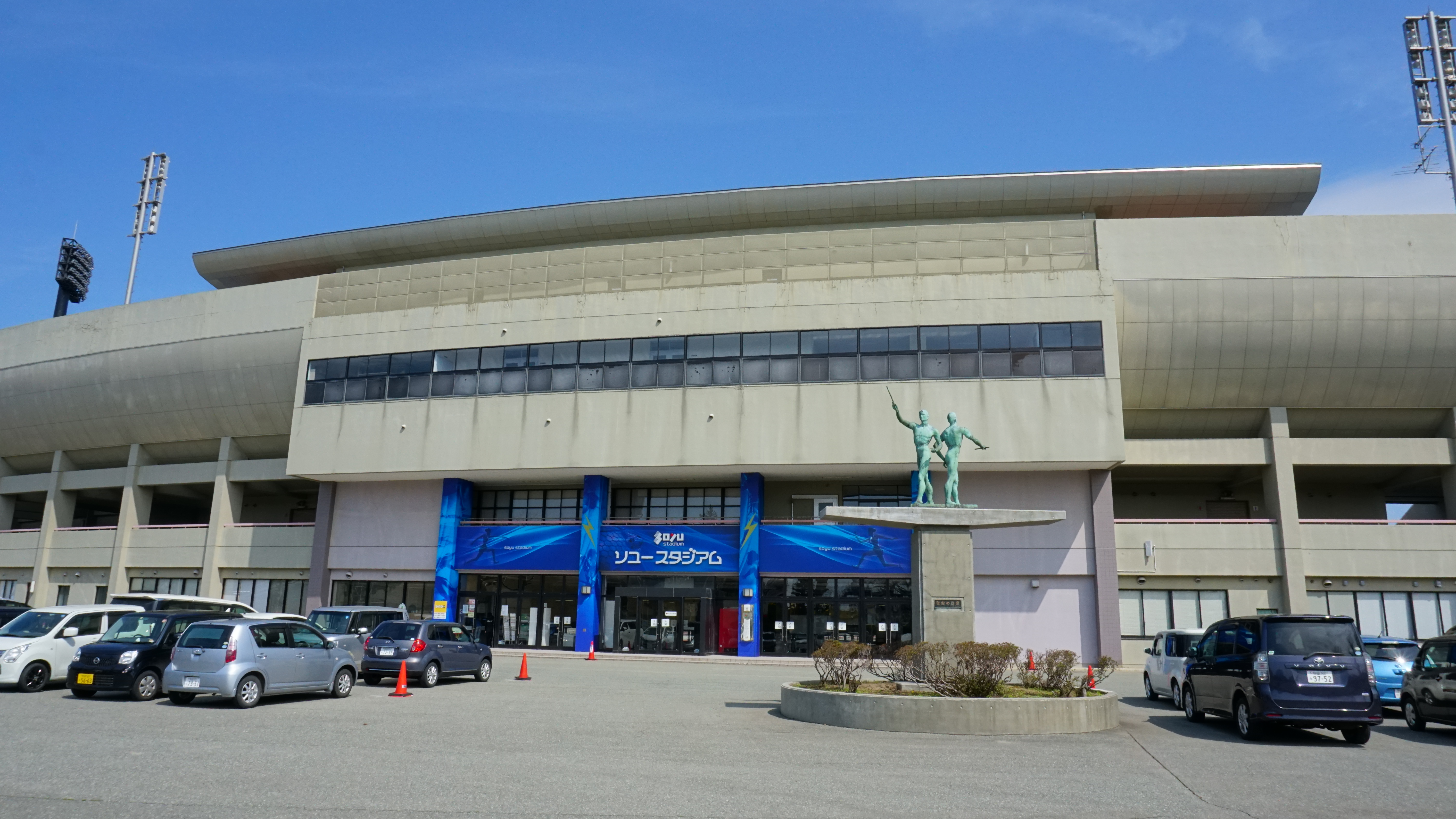 秋田市八橋運動公園陸上競技場。2018年から2019年にかけ、J2ライセンスに適合するよう改修工事が行われ、あわせて地元アミューズメント企業ソユーが命名権を取得し、ソユースタジアムと称するようになった。